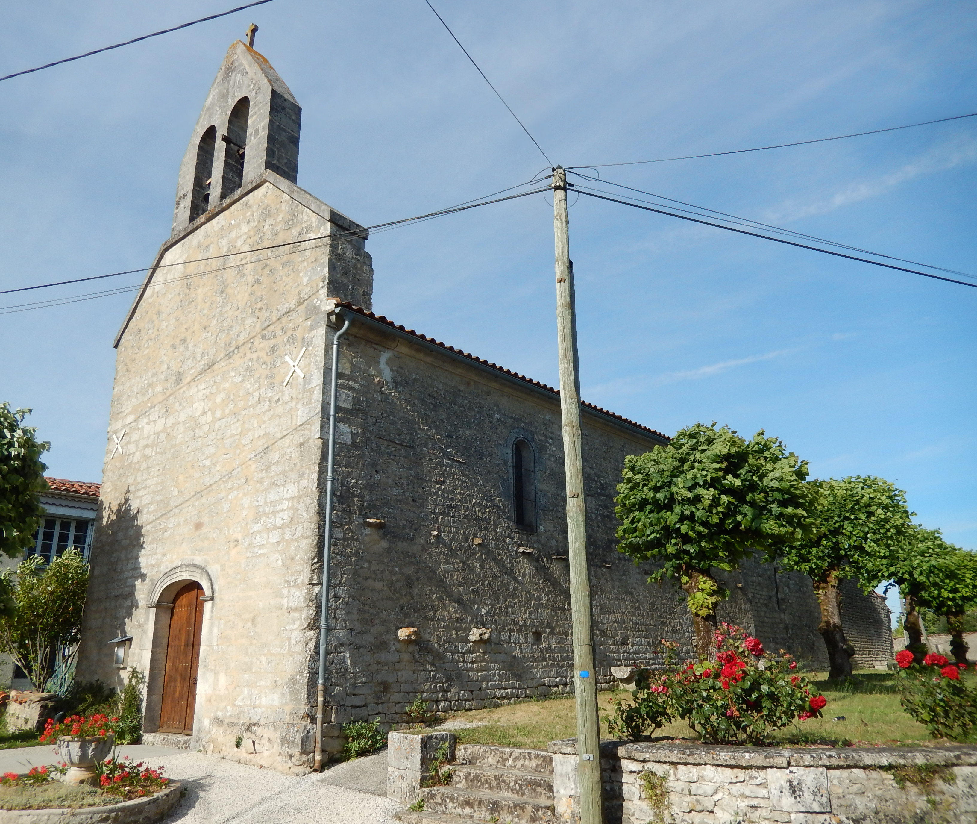 L'église Saint-Martin de Vergné. (Cette image est un recoupage de deux photos.)